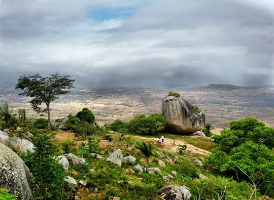 Vista a partir do alto da Serra Velha comunidade do município de Ingá-PB localizada a mais de 500 metros de altura.